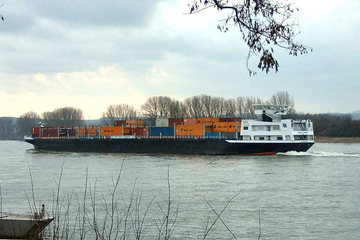 Containerschiff Amistade, Niederlande